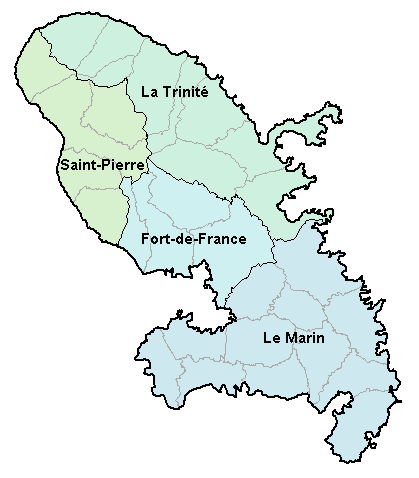 Carte de la Martinique avec ses 4 arrondissements. Map of French department of Martinique with its 4 "arrondissements".